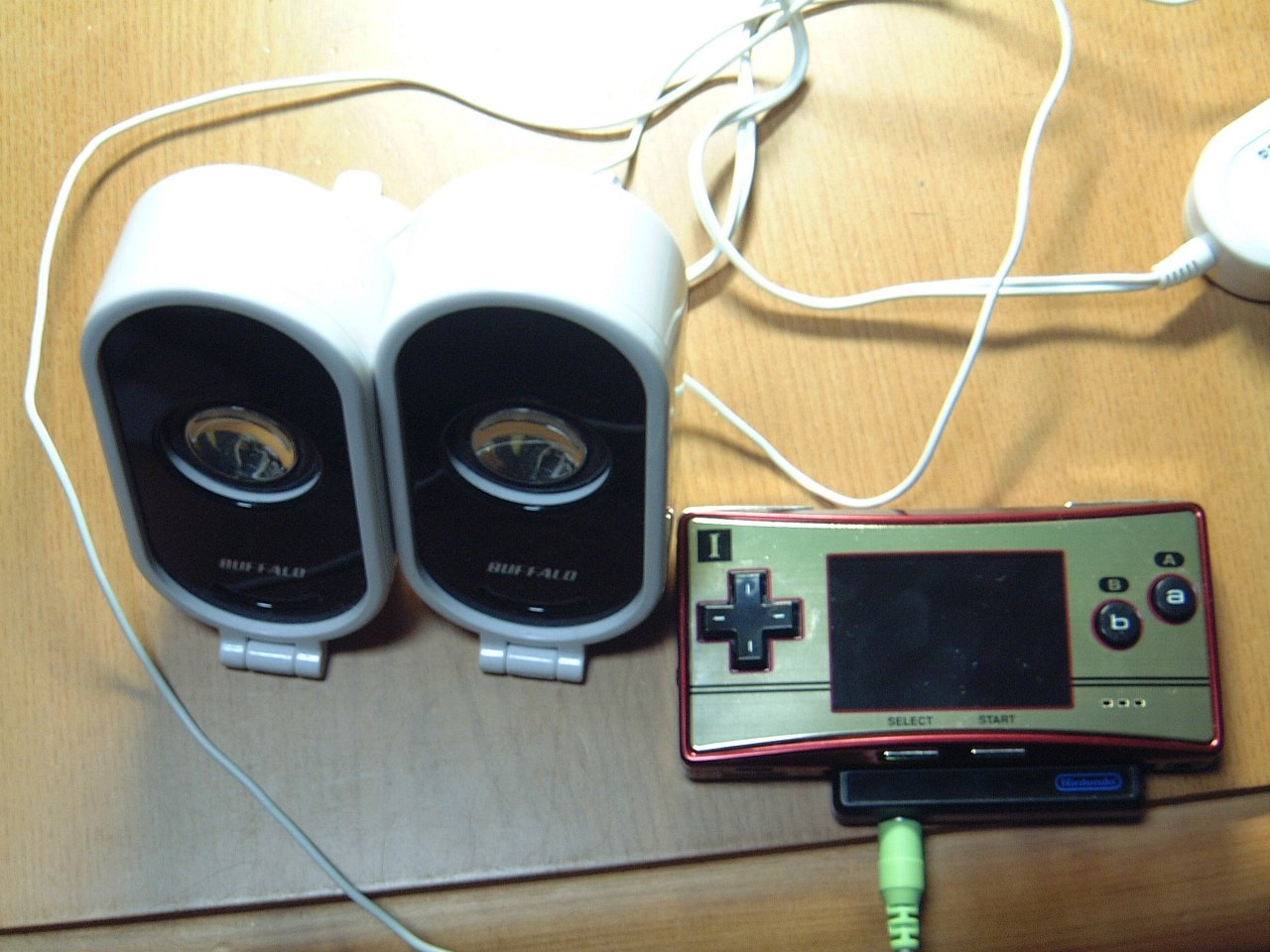 投稿者所有物